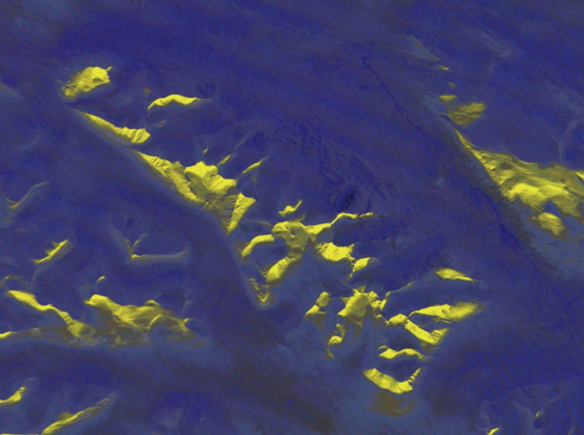 Le Sarektjåkkå (point culminant : Stortoppen, 2 089 m), à la lumière rasante de l'hiver suédois. Photo prise le 20 janvier 2002 (NASA ASTER).